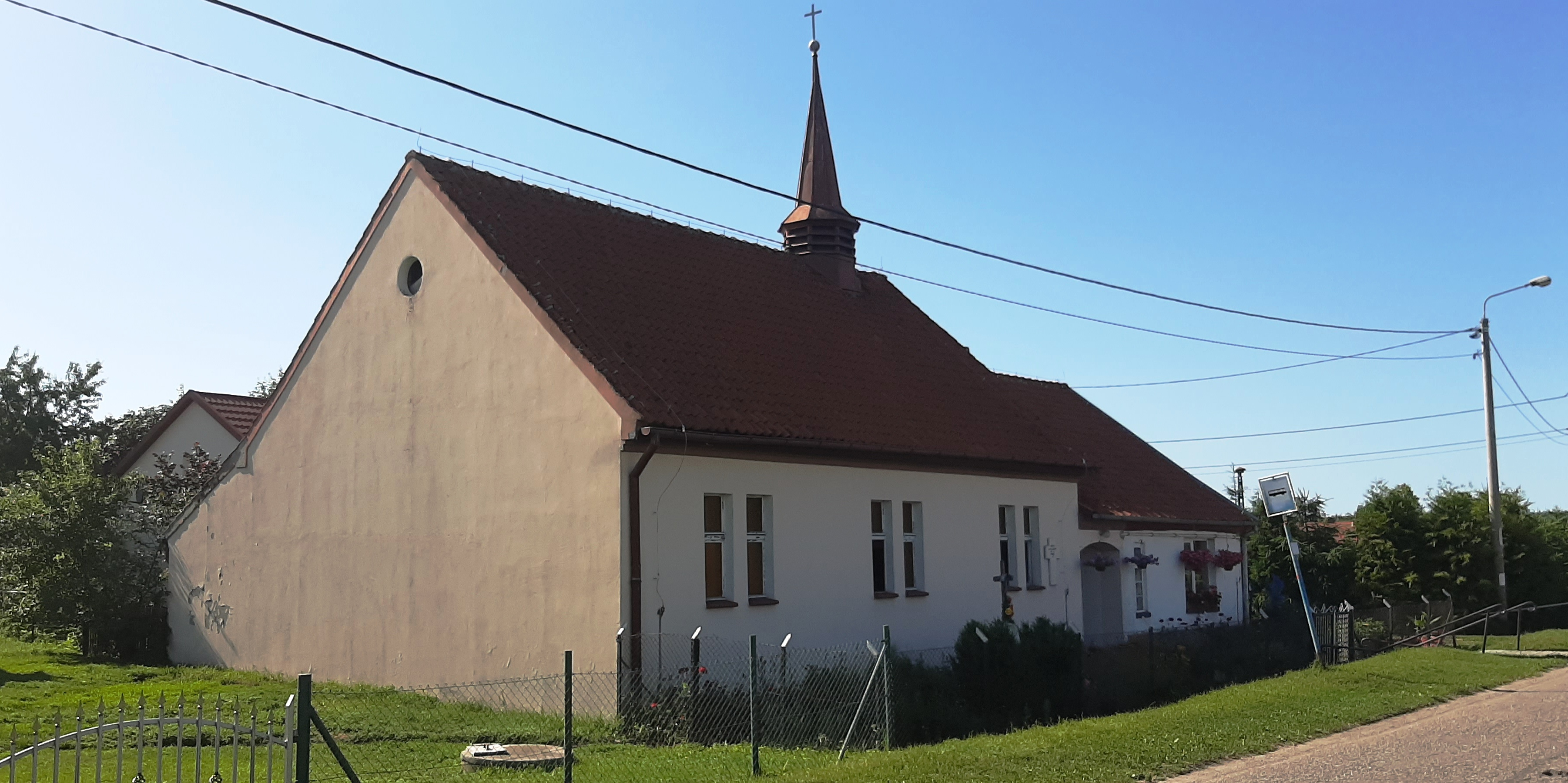 Kaplica Kurowo Braniewskie 2019